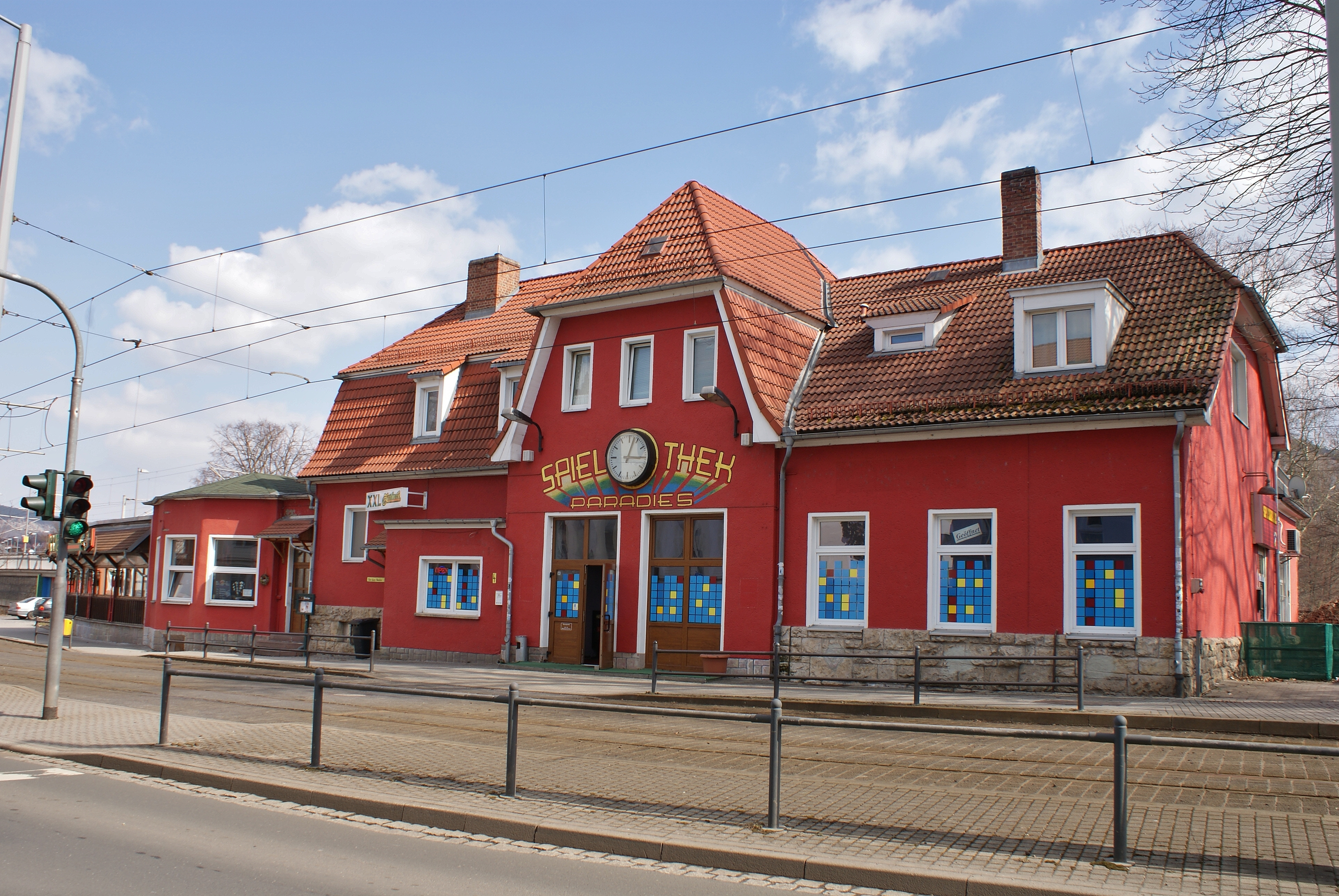 Das ehemalige Gebäude des Bahnhofs Jena Paradies (Vor dem Neutor). Der heutige Paradiesbahnhof liegt einige Meter nordwestlich davon.